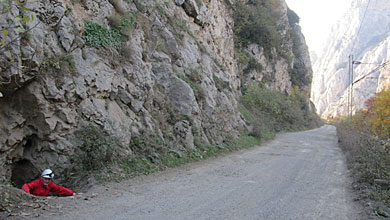 пештера Бела вода